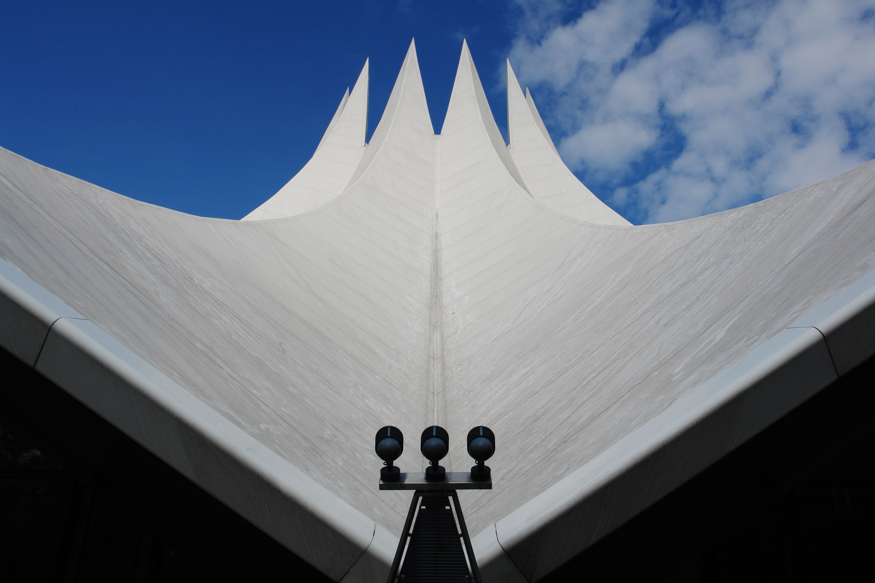 Tempodrom.